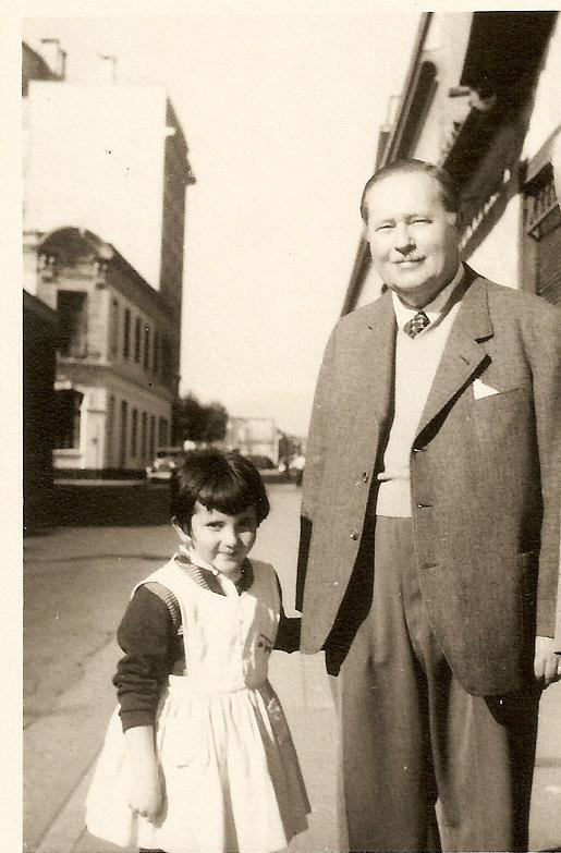 Looser y su ahijada Gualterio Looser